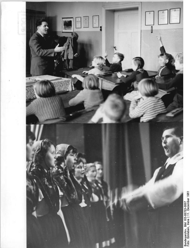 Breitenfeld, Mitglied des Dorfensembles Zentralbild Eckleben 11.12.1961 Breitenfeld-singendes und tanzendes Dorf in der Altmark 254 Einwohner zählt das im Bezirk Magdeburg in der Nähe von Gardelegen liegende vollgenossenschaftliche Dorf Breitenfeld. Vor etwa zehn Jahren begann der Lehrer des Dorfes und heutige Ensembleleiter Wilhelm Reinhardt mit Jugendlichen altmärkische Volkslieder zu singen. Das war die Grundlage für das jetzt rund 80 Mitglieder zählende Dorfensemble-. Heute sind vom neunjährigen Schulmädchen bis zum 68jährigen Rentner, die Genossenschaftsbäuerinnen und -bauern der LPG Typ I und Typ III, die Kindergärtnerin, der stellvertretende Bürgermeister, der Schuhmachermeister, sogar Familien-Vater, Mutter und die Kinder- im Dorfensemble uns sich allwöchentlich zur Probe in der Schule einfinden. Ihre Mühe, ihr Fleiß und ihre Begeisterung wurden 1956 mit der Auszeichnung des Staatspreises für künsterlisches Volksschaffen belohnt. Augenblicklich wird an dem neuen Programm gearbeitet, das anlässlich des Volkskunstwettbewerbes und der IV. Arbeiterfestspiele im nächsten Jahr aufgeführt werden soll. UBz: "Wieviel ist 39 und 41?" fragt der 57jährige Schulleiter Wilhelm Reinhardt während des Rechenunterrichts. Wer besonders fleissig in der Schule ist, wird in das Ensemble aufgenommen.-"Her die Siebenmeilenstiefel, damit es schneller, immer schneller vorwärts geht." Lehrer Wilhelm Reinhardt abends als Chorleiter.